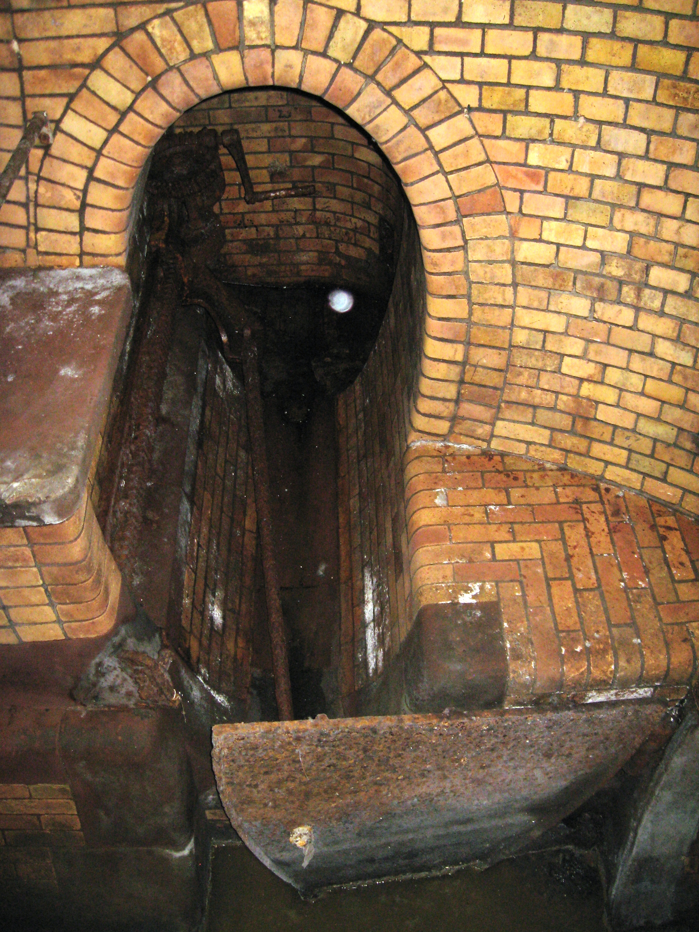 Mannheim, Fremdeneinstieg in die Kanalisation vor F1; Schwalltür mit Antriebsstange